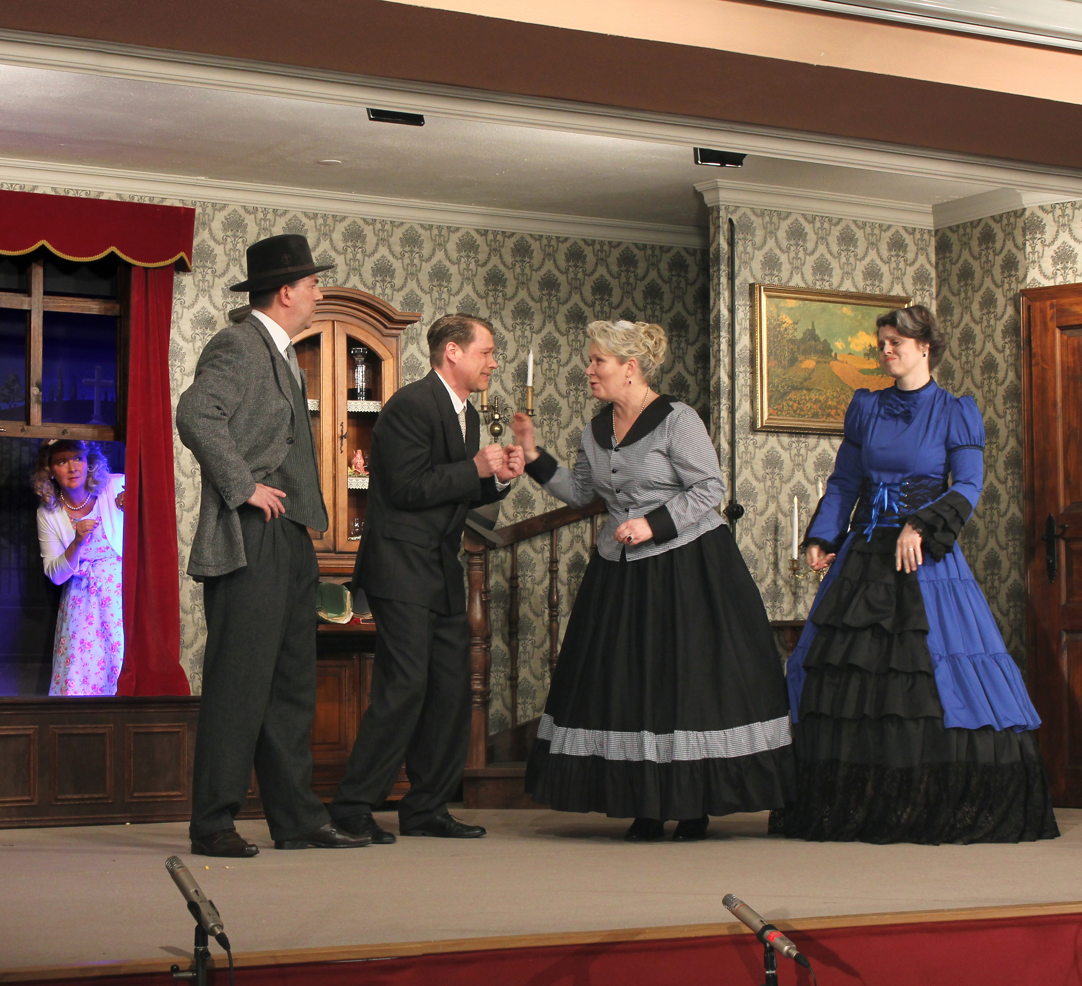 Arsen und Spitzenhäubchen, Aufführung der Kolping-Theatergruppe Kärlich, Szene: Was soll Leutnant Rooney erfahren?